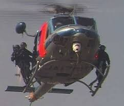 2002年5月10日に公開されたSAT訓練映像からの写真。ベル412EP「おおとり7号」からのラペリングを準備するSAT隊員。